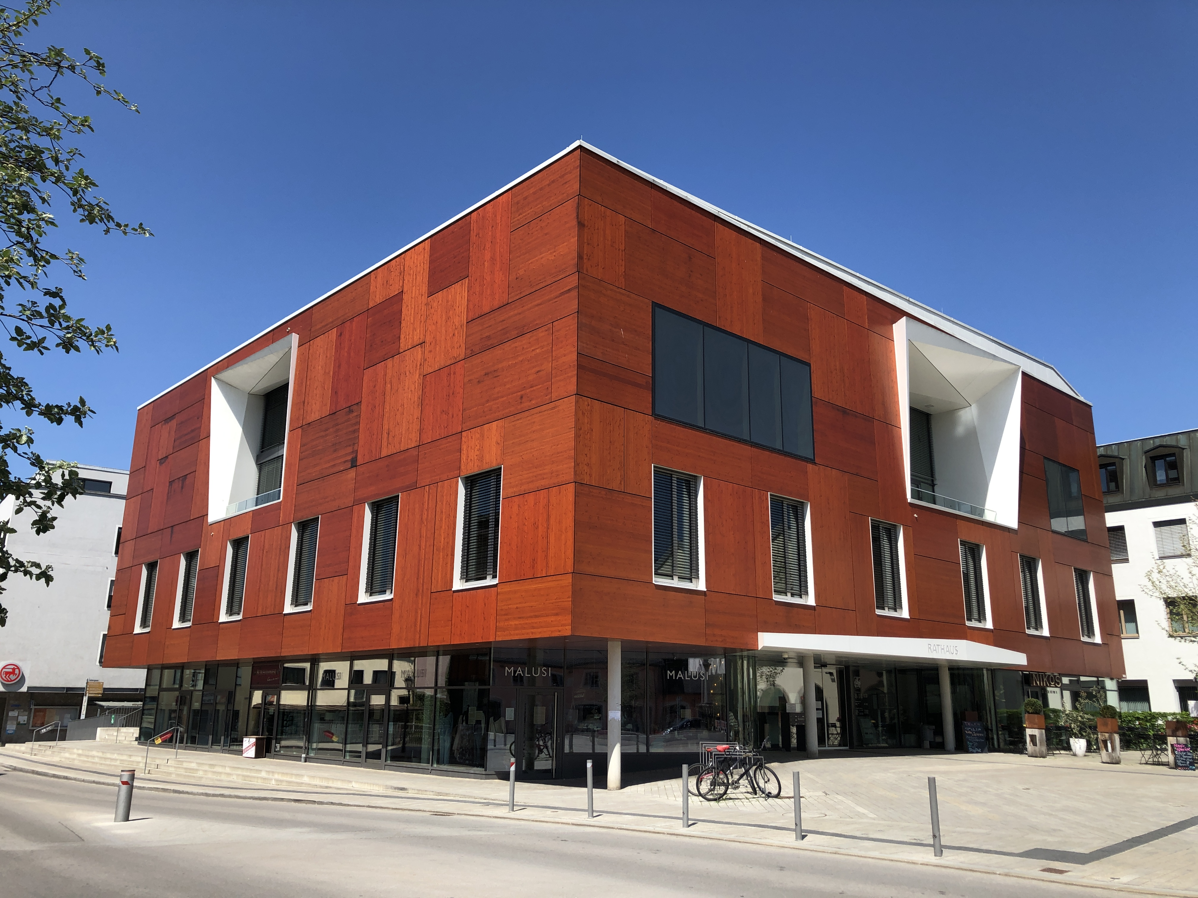 Das neue Rathaus in Bad Aibling. Eröffnet wurde es im Jahr 2012. Es beinhaltet eine Bibliothek, Bürgerbüro, Standesamt, Lesecafe und noch vieles mehr.